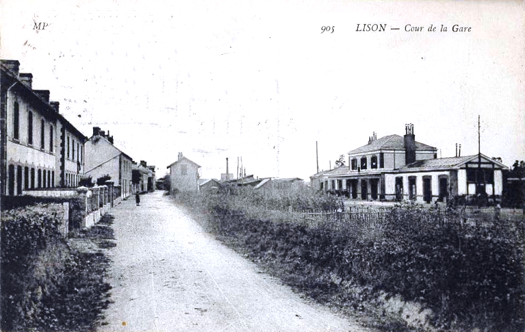 Gare de Lison, début du XXème siècle.